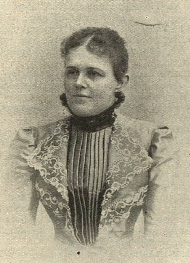 Porträtt i tidningen Idun (1900, nr 15, s 229) av Stina Swartling (1858-1929)